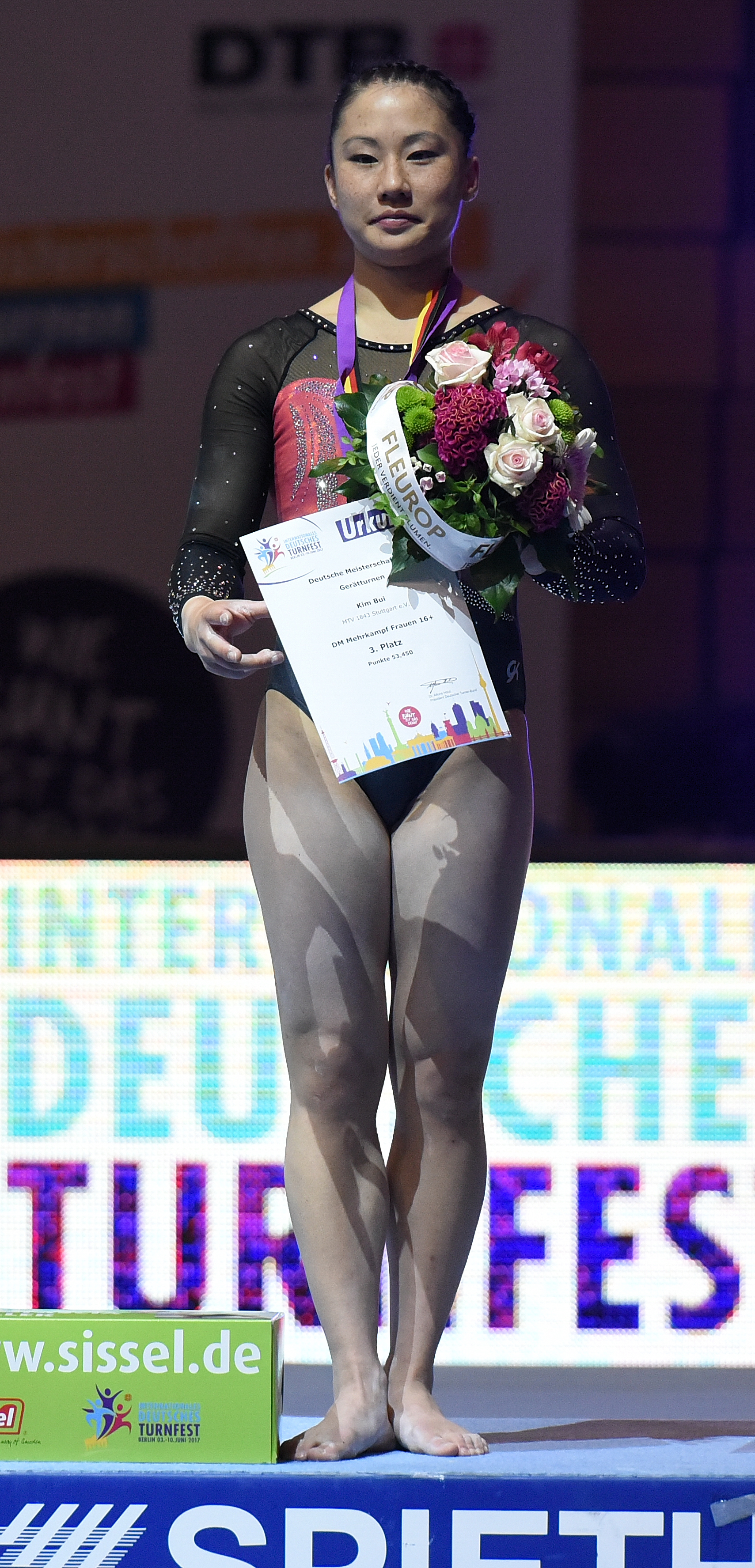 Deutsche Meisterschaften Gerätturnen Mehrkampf weiblich Siegerehrung beim Internationalen Deutschen Turnfest Berlin 2017.